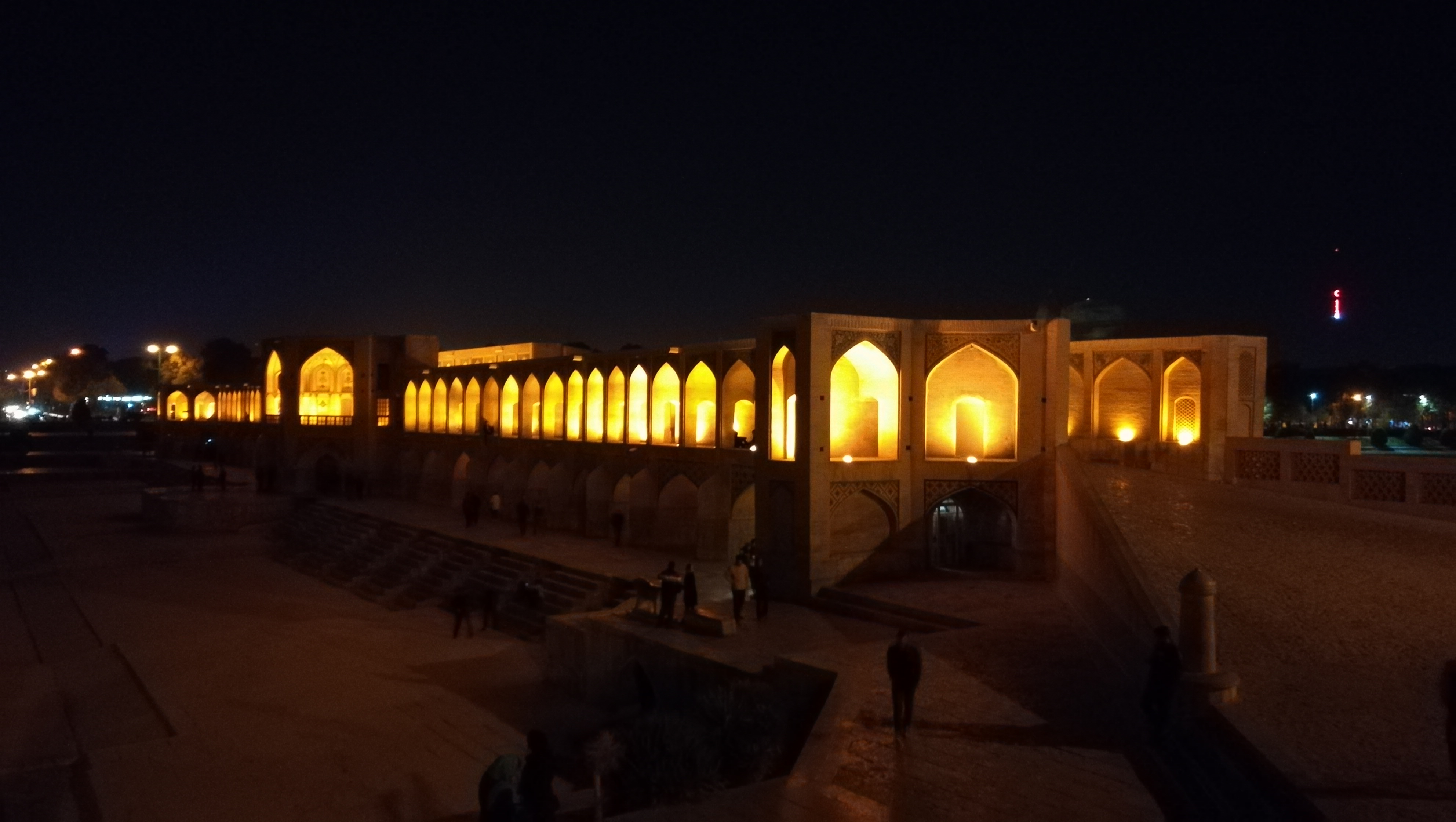 Osvětlený most Chádžú v nočním Isfahánu